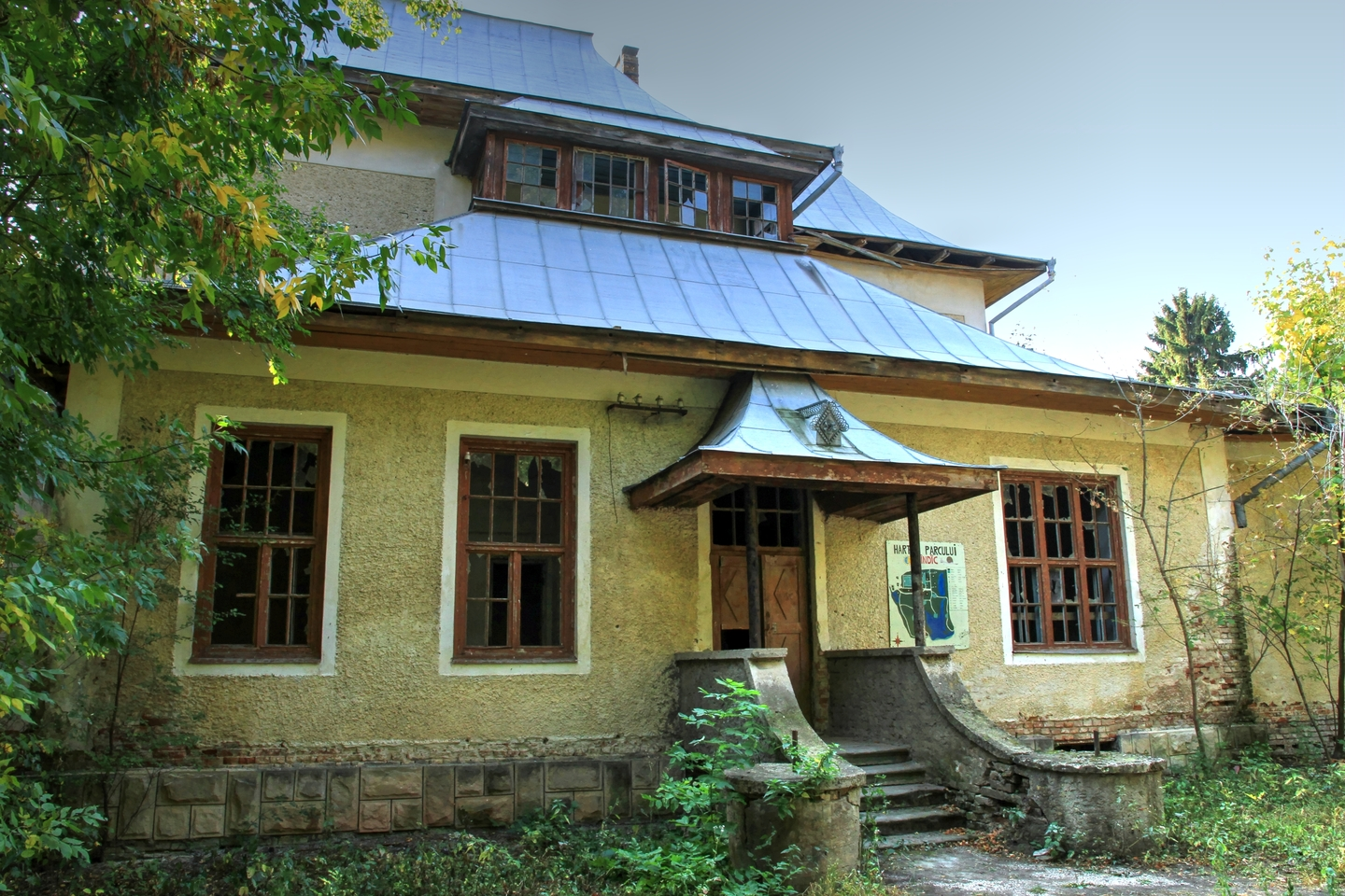 Мындыкский парк, монумент природы, находится в Дондушенский район, Между селами Мындык и Ильичевка (код MD-DN-map-011)